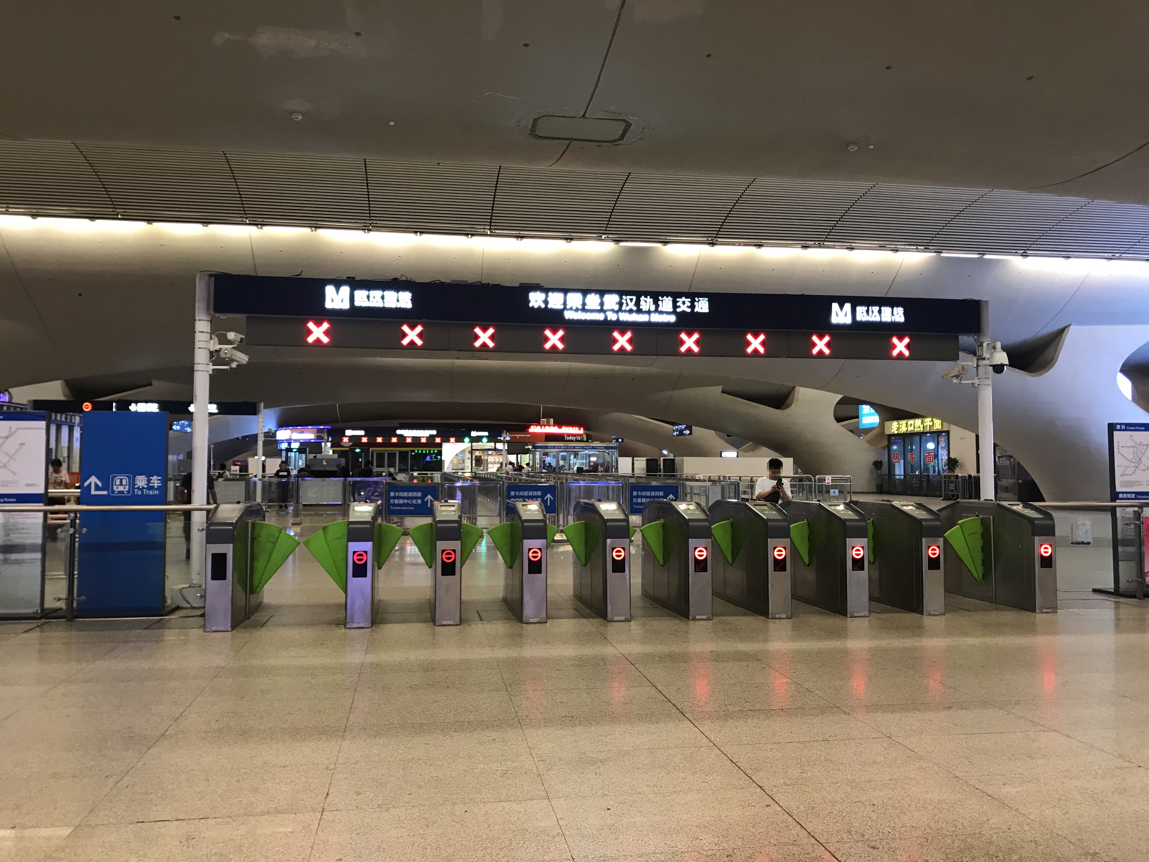 武漢駅駅(武漢地下鉄)の入り口